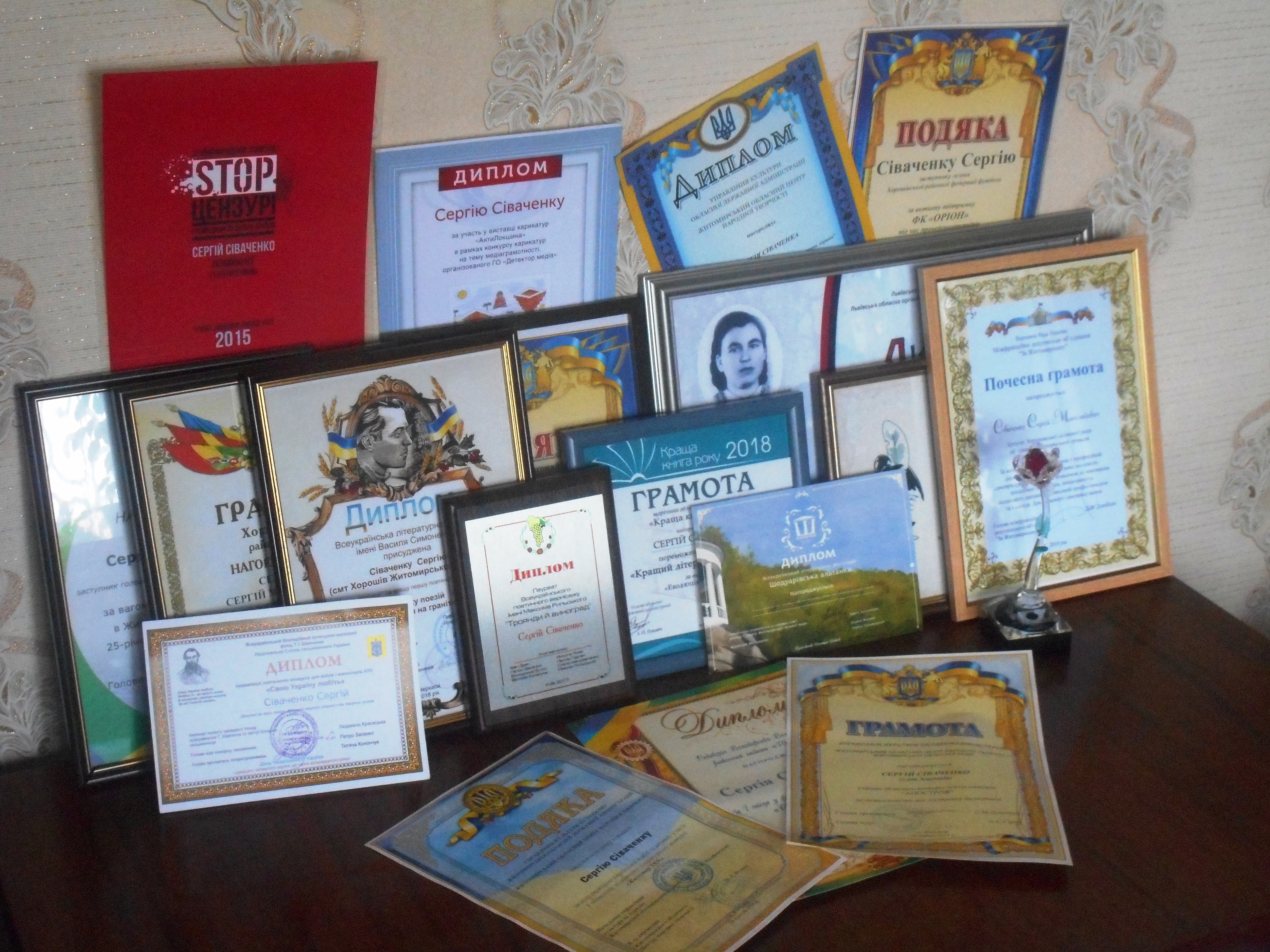 Загальне фото з нагородами Сергія Сіваченка за поетичну, спортивну та громадську діяльність